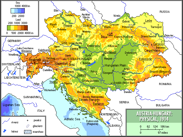 Austria-Hungary 1914, physical/Mapa fizyczna Austro-Węgier 1914